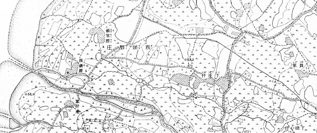 臺灣堡圖－桃園市新屋區崁頭屋周圍截圖。本圖1904年出版，已超過版權保護期。